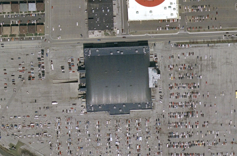 Allstate Arena (nasa world wind 1.3.5)